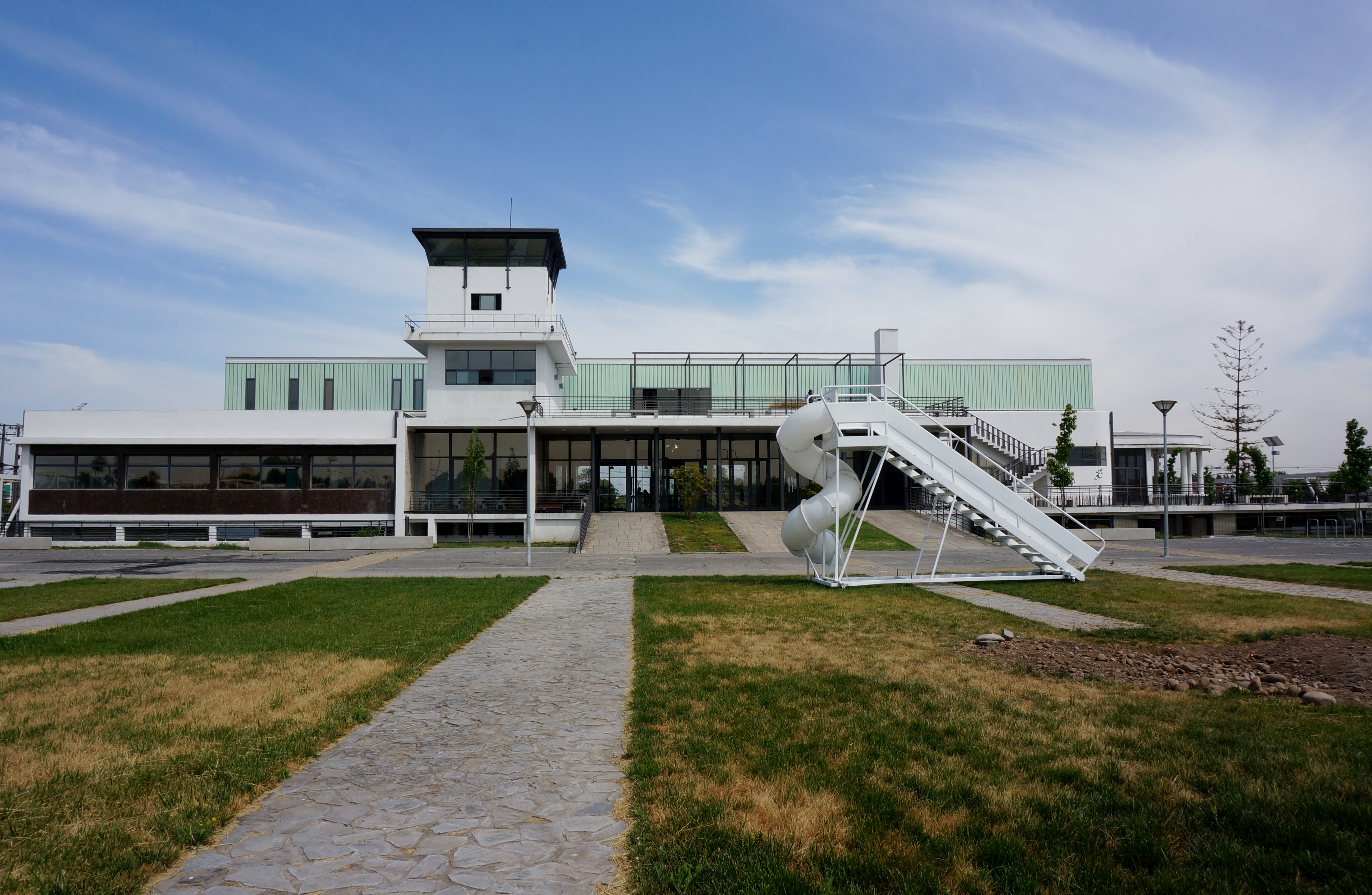 Parte de las antiguas pistas del aeropuerto Los Cerrillos, hoy en el Centro Nacional de Arte Contemporáneo Cerrillos (CNACC), Santiago de Chile. La escalera de avión es obra del artista visual Máximo Corvalán-Pincheira ; al fondo, edificio modernista que antes era el principal del aeropuerto y ahora alberga al CNACC.